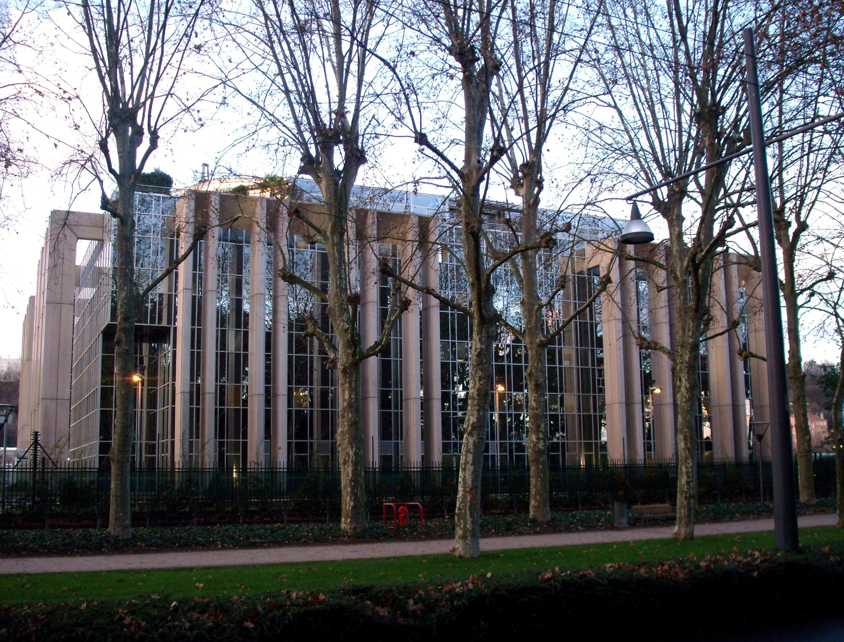 Siège mondial d'Interpol, à Lyon. Entre le Rhône et le Parc de la Tête d'Or.